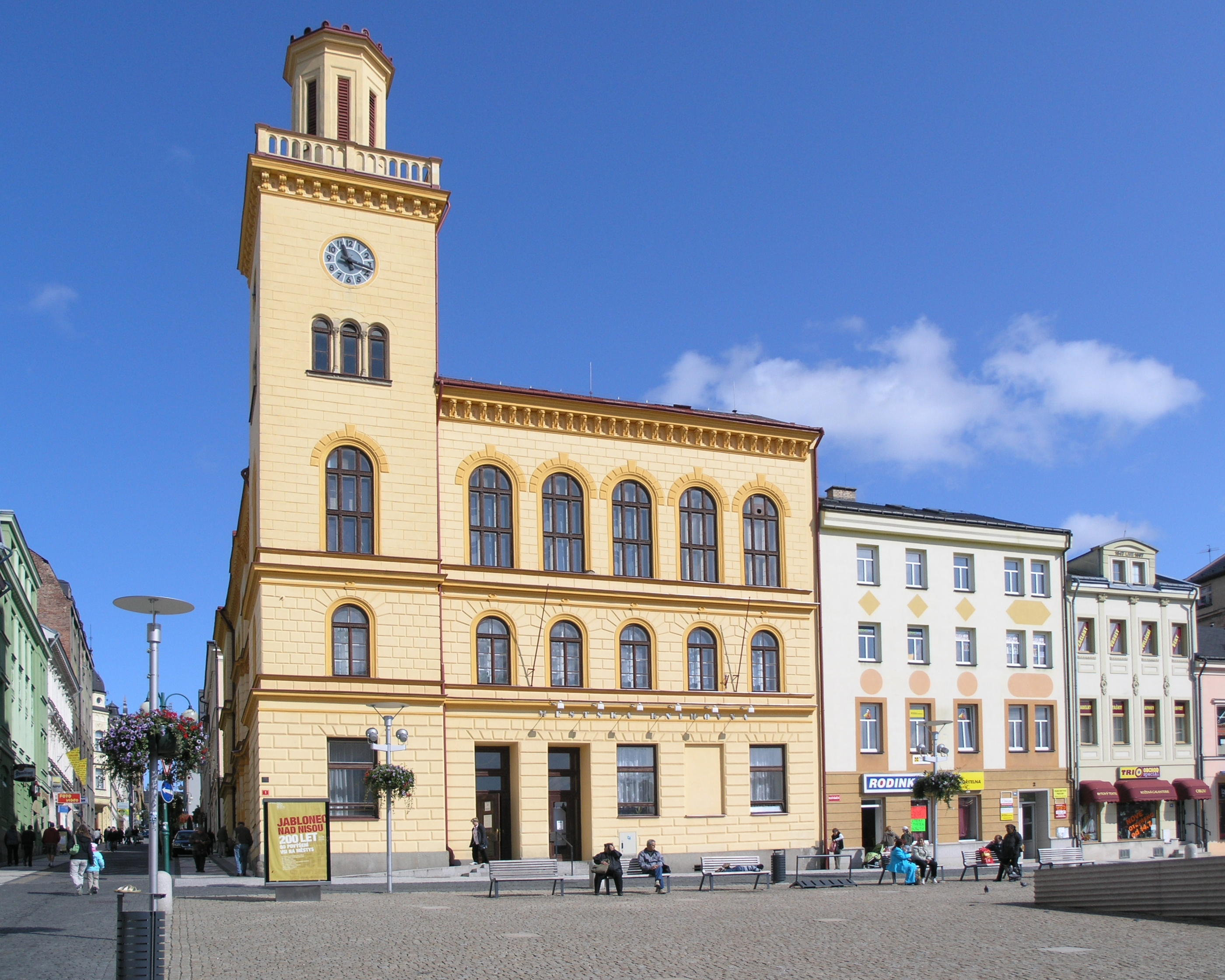 Česká republika, Jablonec nad Nisou - stará radnice na Dolním náměstí